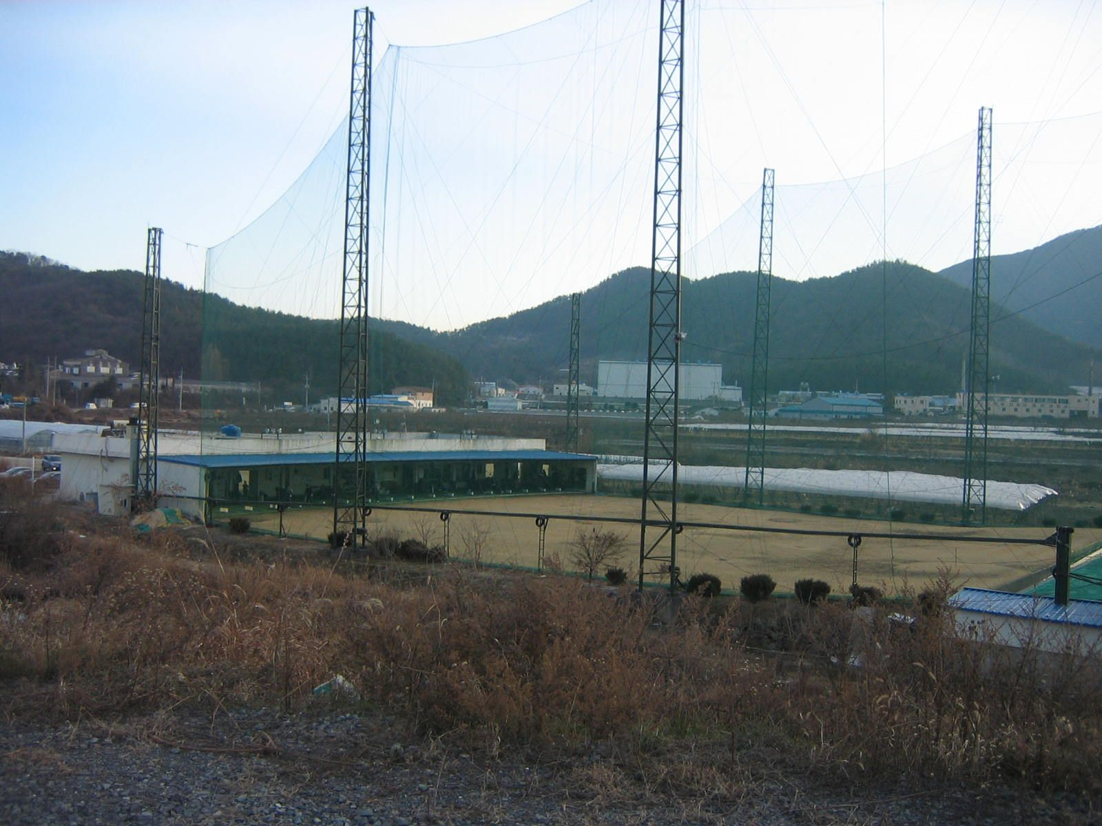 Outdoor public batting cage in Bubuk-myeon, Miryang-si, Gyeongsangnam-do.